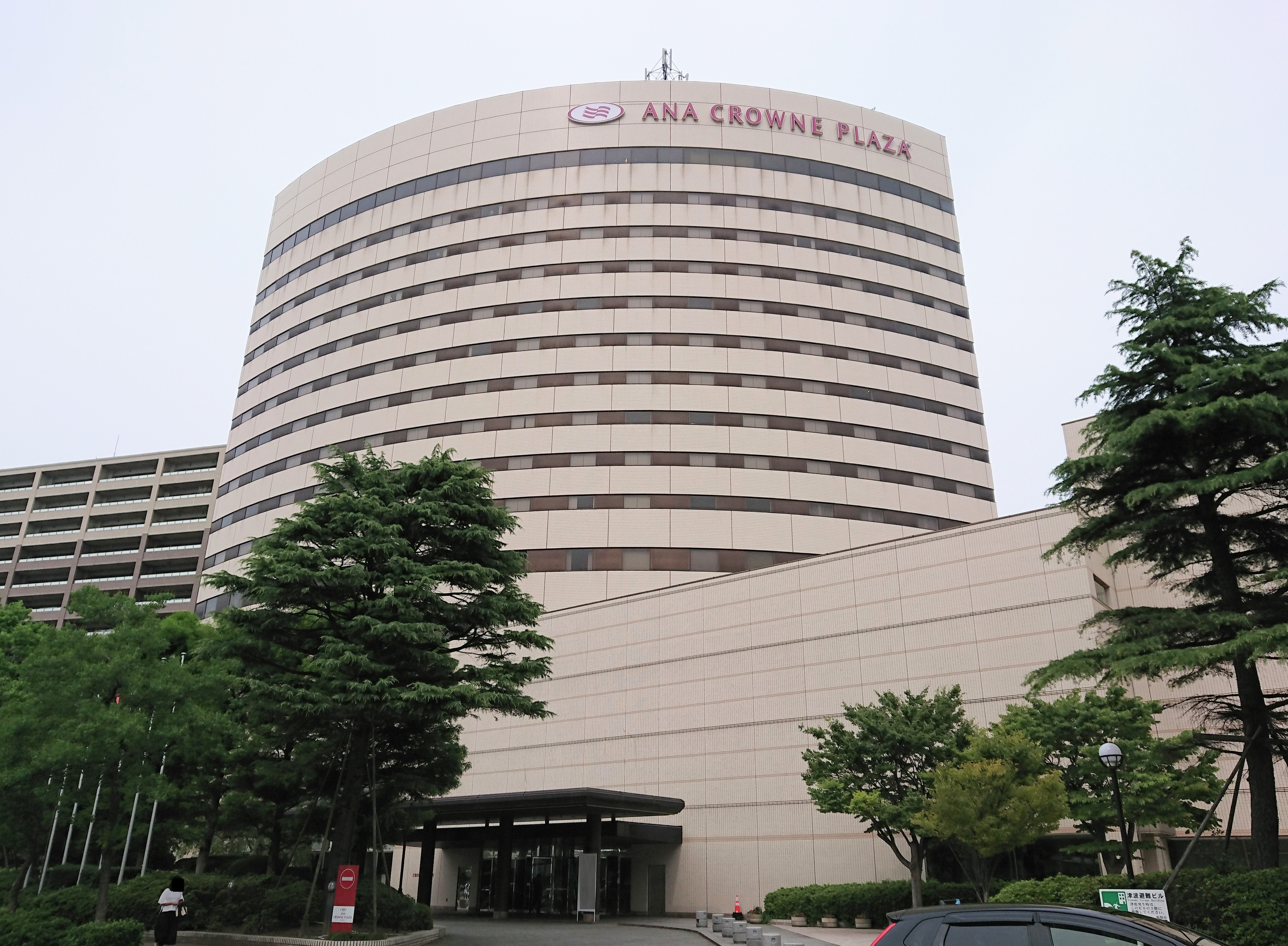 ANAクラウンプラザ新潟の外観